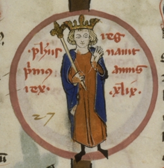 Philippe Ier , roi de France